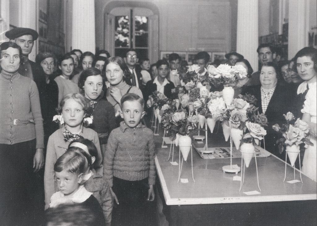 Exposició de roses a Can Nadal, 1931, organitzada pels Amics de les arts i de les LLetres